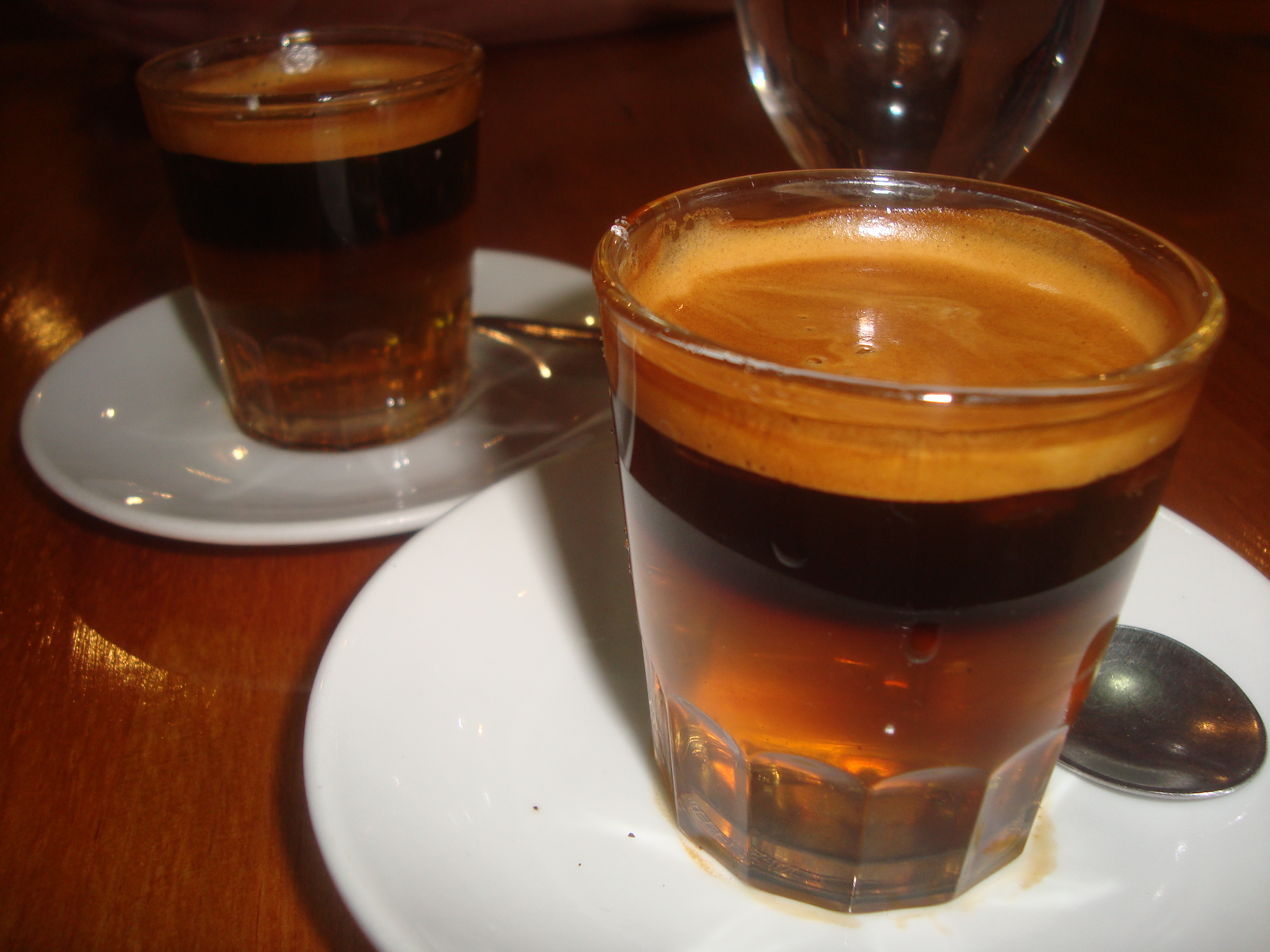 Carajillos